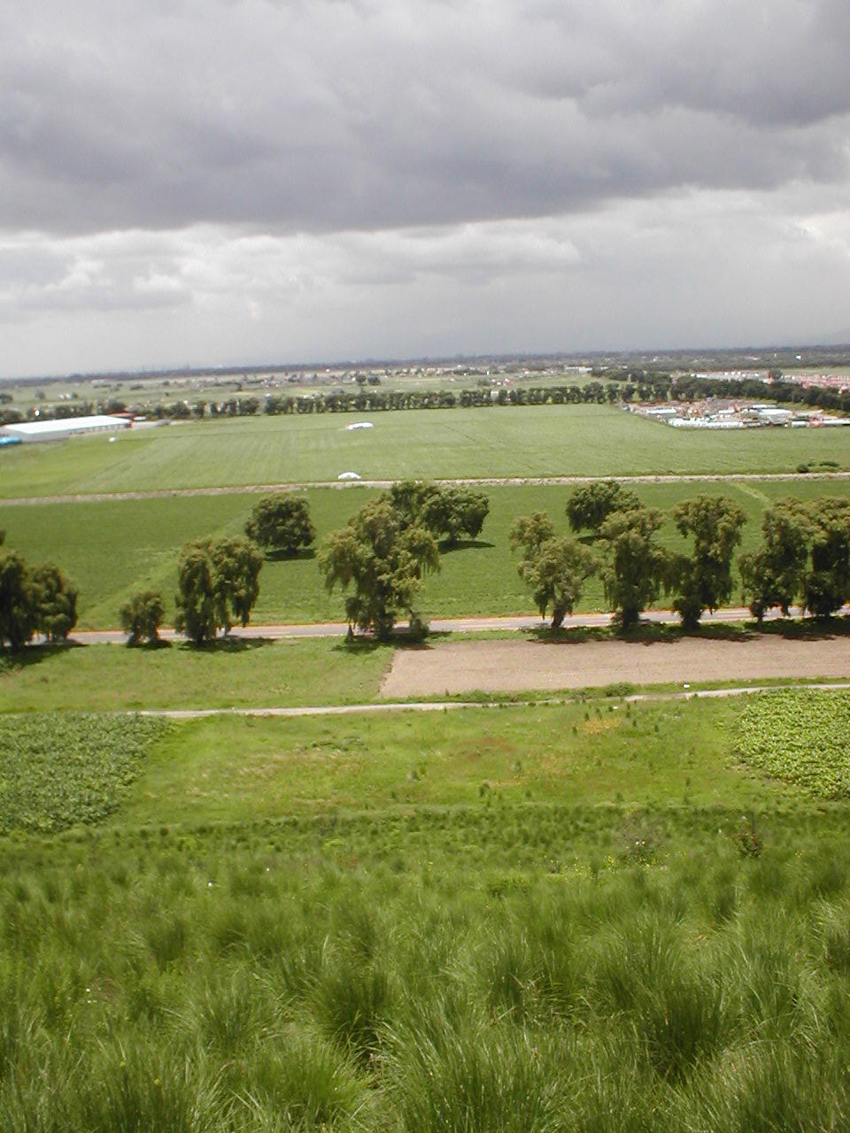 Pasto y sauces llorones desde el Cerro del Chapulín, en el municipio de Chapultepec, Estado de México